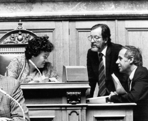 Die Schweizer Nationalratspräsidentin Hedi Lang, der Generalsekretär der Bundesversammlung Jean-Marc Sauvant und Nationalrat Jean Ziegler. Ausschnitt des Originalbildes.